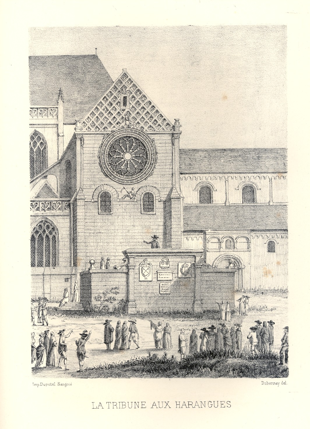 La tribune aux harangues édifiée devant le croisillon nord de l'église Saint-Étienne en 1630, en remplacement d'une tribune plus ancienne.